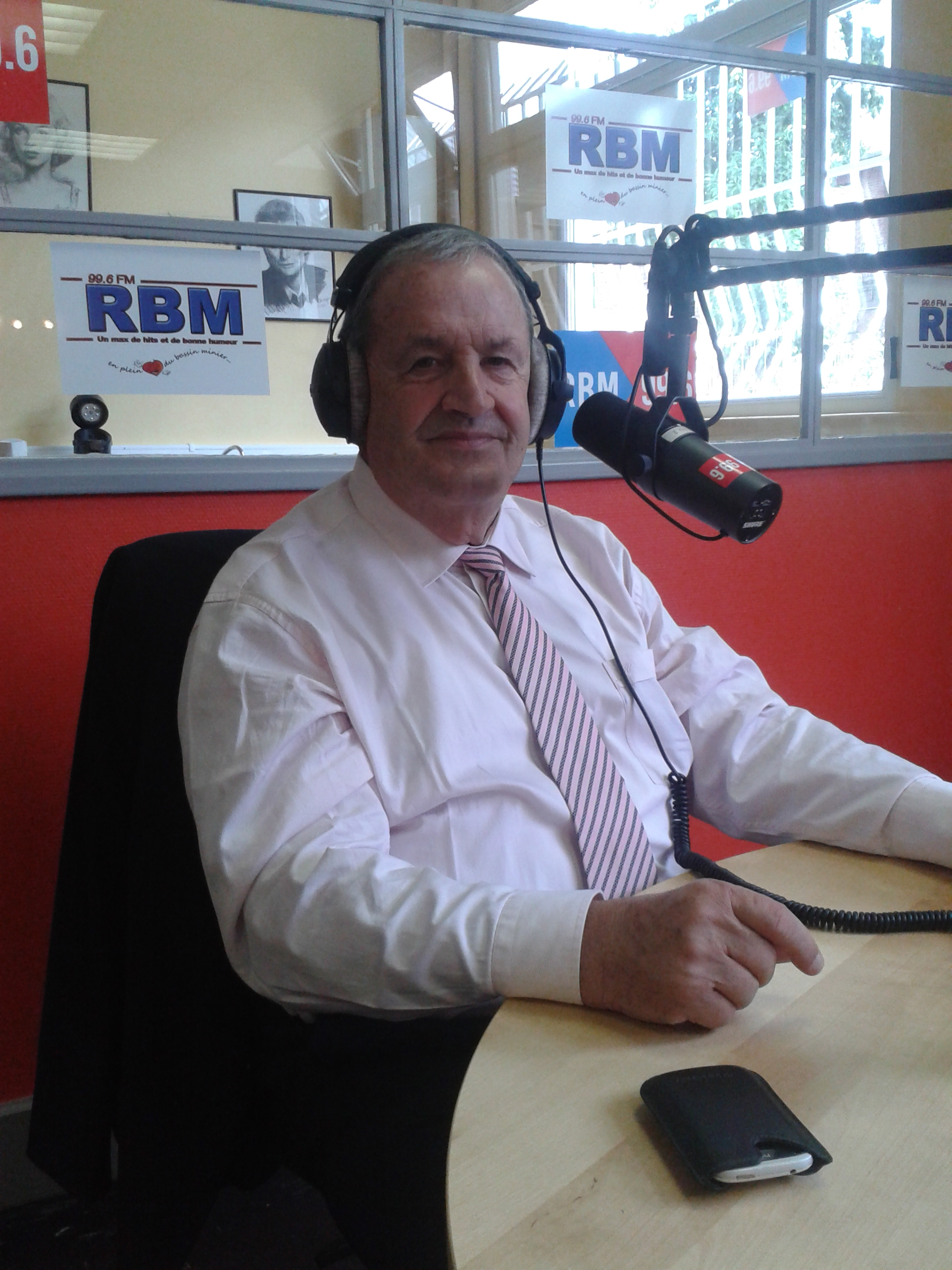 Fernand Duchaussoy,lors de l'émission "En Pleine Lucarne", sur la radio RBM 99.6 FM, en septembre 2013